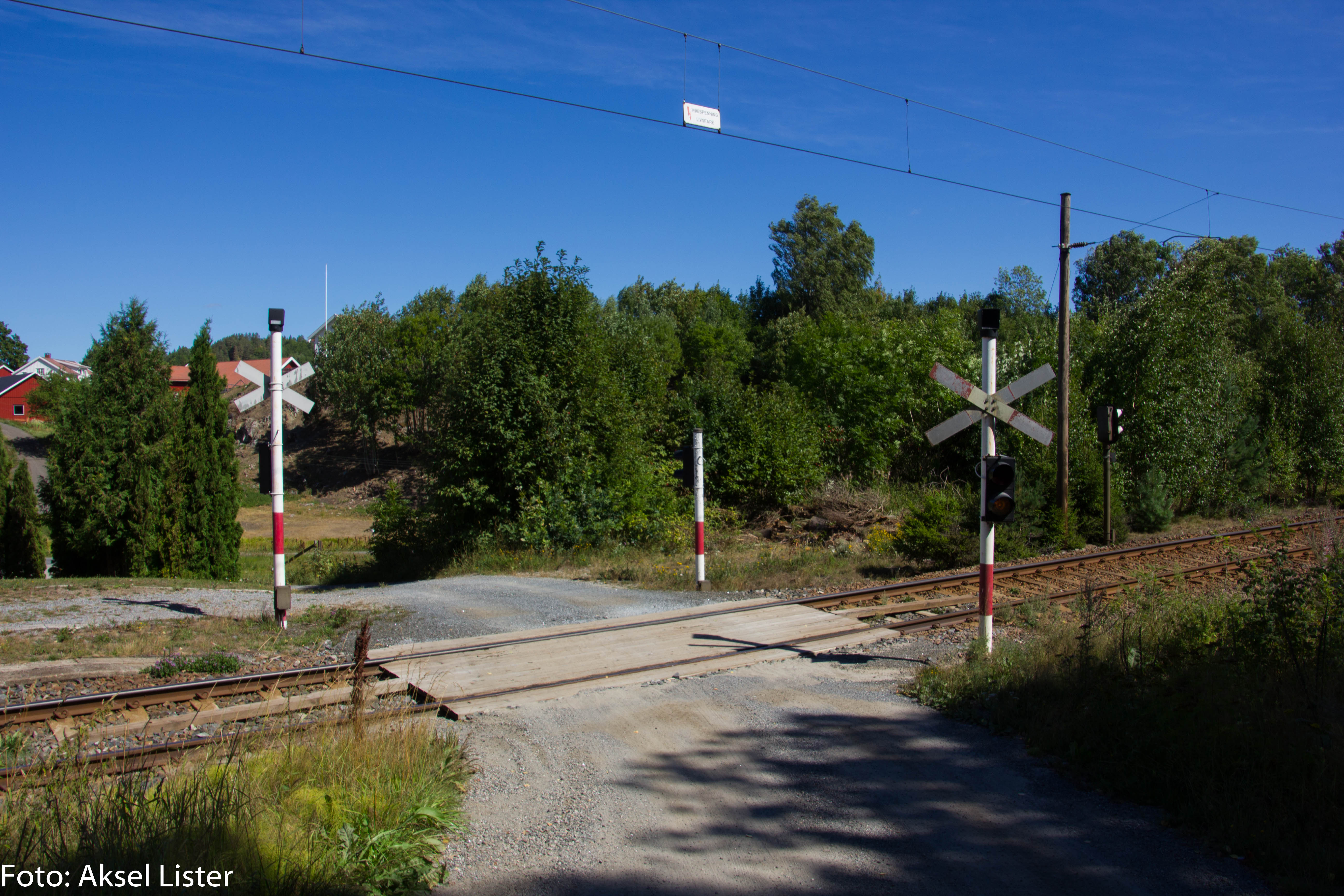 Planovergangen som gikk over stasjonsområdet.